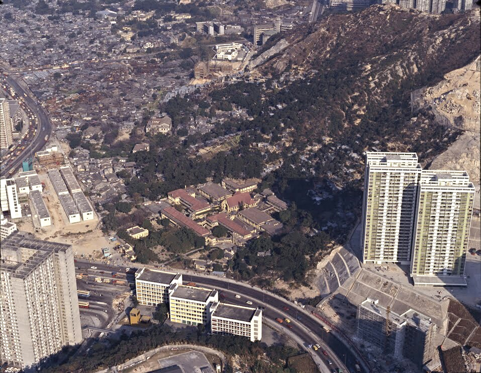 香港牛池灣82